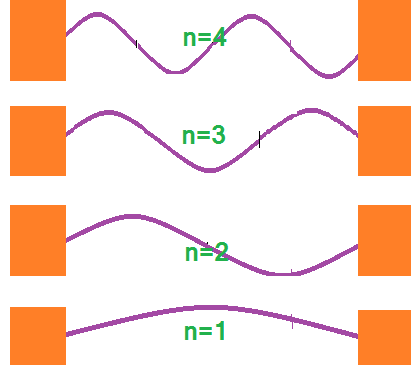 ਪੰਜਾਬੀ: ਕਿਸੇ ਡੱਬੇ ਅੰਦਰ ਇੱਕ ਇੱਕ-ਅਯਾਮੀ ਕਣ ਦੀਆਂ ਪਹਿਲੀਆਂ ਚਾਰ ਅਵਸਥਾਵਾਂ ਲਈ ਸ਼ੁਰੂਆਤੀ ਵੇਵ ਫੰਕਸ਼ਨ